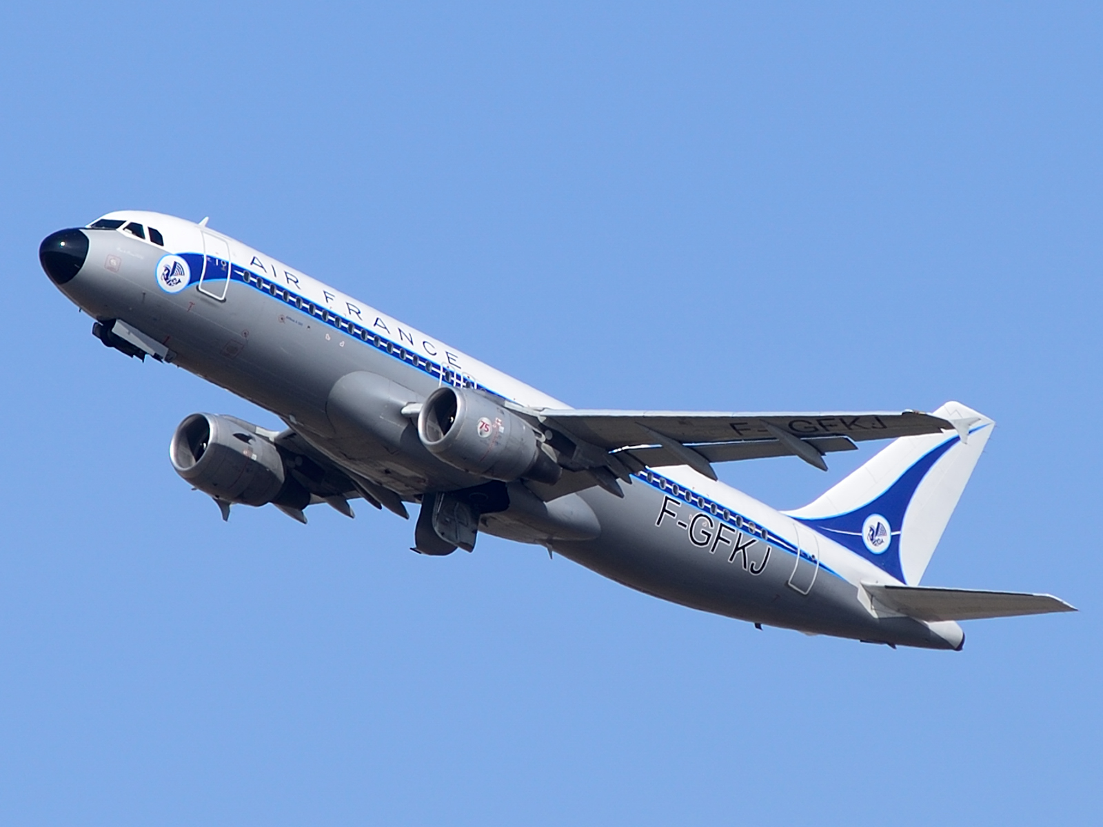 Air France A320-211 F-GFKJ